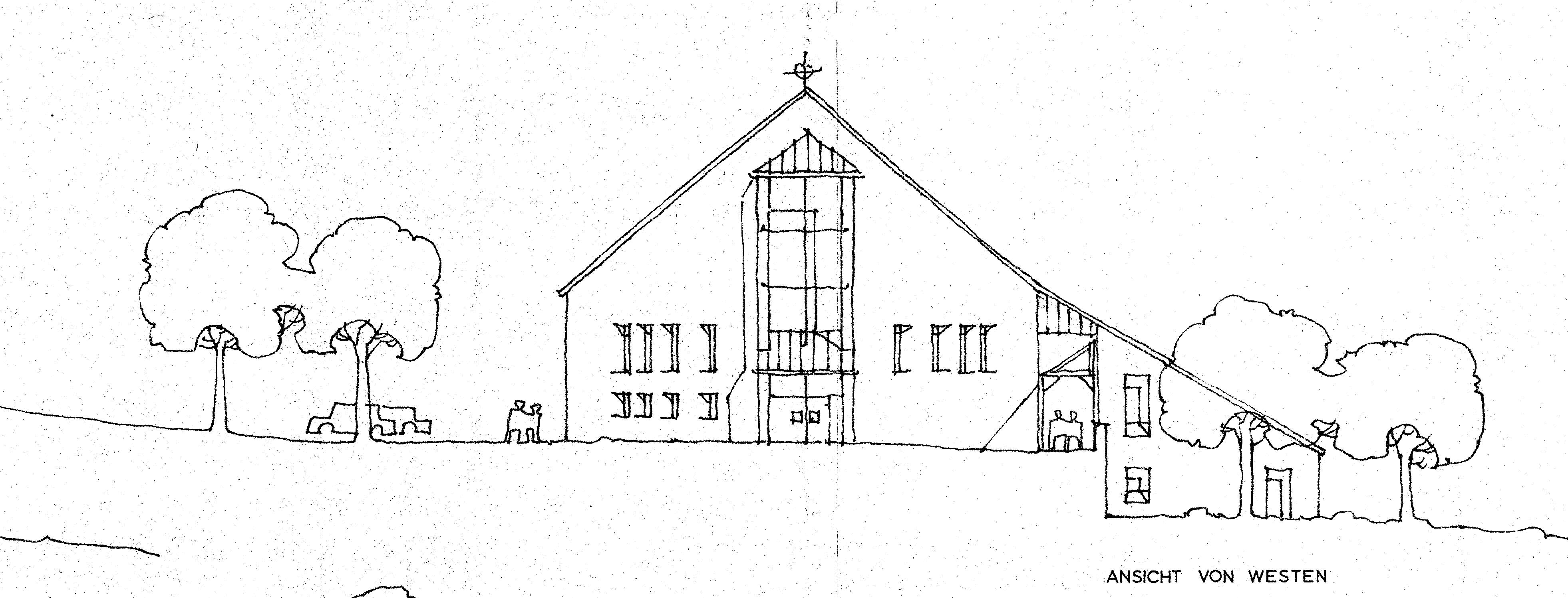 Diese Ansicht zeigt die West-Ansicht der Kirche St. Benedikt in Regensburg Oberisling aus der Genehmigungsplanung des Architekturbüros Wenz+Zettel